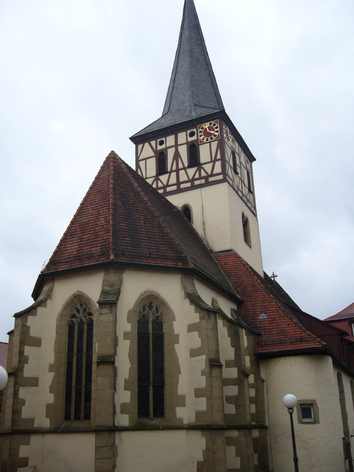 Die evangelische Nikolauskirche in Ingelfingen